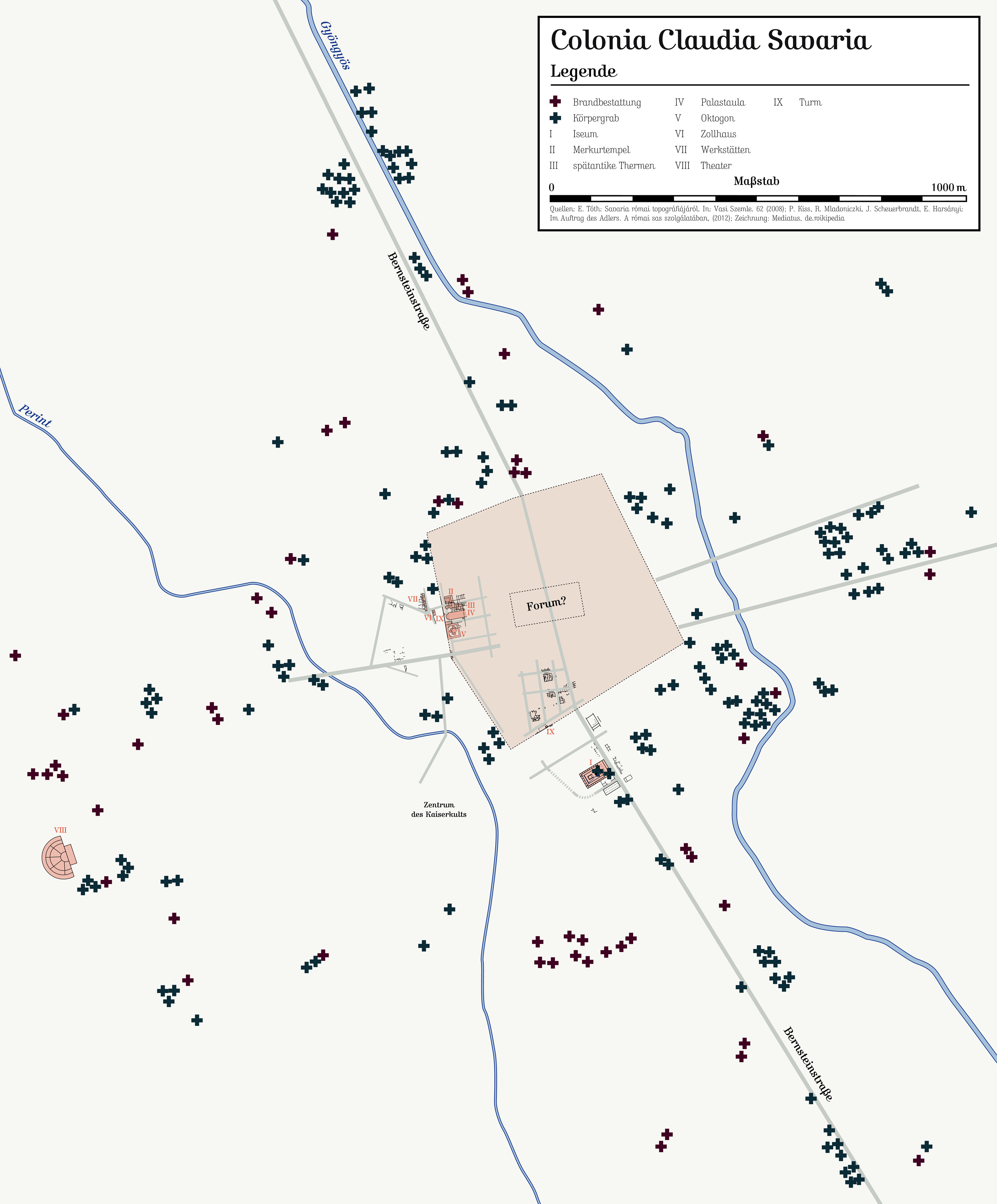 Die Colonia CLaudia Savaria (Szombathely). Quellenangaben erfolgen in der Datei selbst.